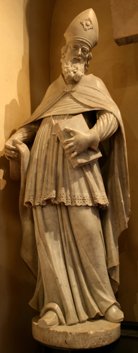 snimljeno u u Muzeju grada Zagreba